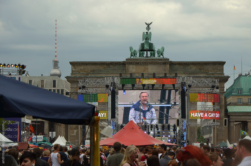 Klaus Wowereit bei Berliner CSD 2012